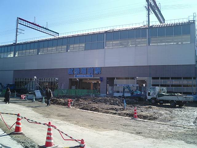 撮影場所：試験場前駅 撮影日：2005/12/27 撮影者：私(Night shadow)本人が撮影